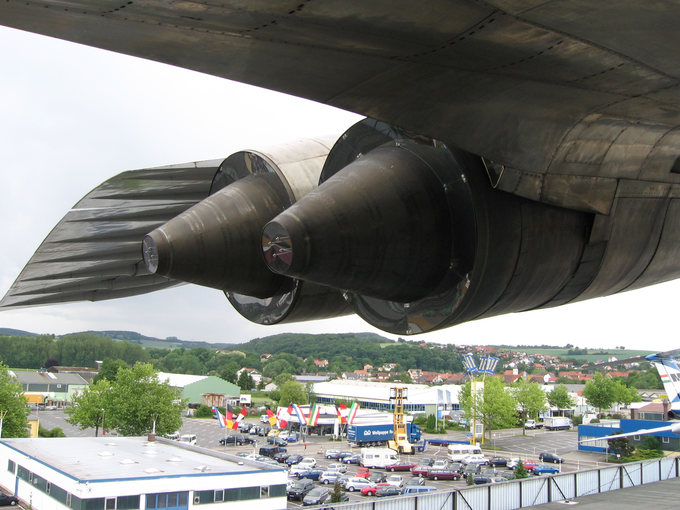 Die Nachbrenner der linken beiden Triebwerke der Tupolev Tu-144 im Auto- und Technikmuseum Sinsheim / Deutschland. Das Bild wurde im Mai 2006 von Christian Kath (mir selbst) aufgenommen.